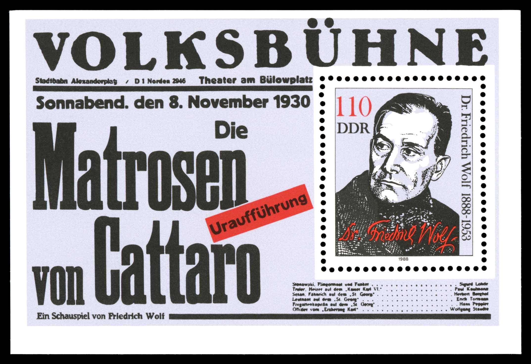 Information: 100. Geburtstag von Friedrich Wolf Ausgabepreis: 110 Pfennig First Day of Issue / Erstausgabetag: 22. November 1988 Auflage: 2.100.000 Entwurf: Soest Druckverfahren: Offsetdruck Michel-Katalog-Nr: Ländercode-MiNr: Block 96